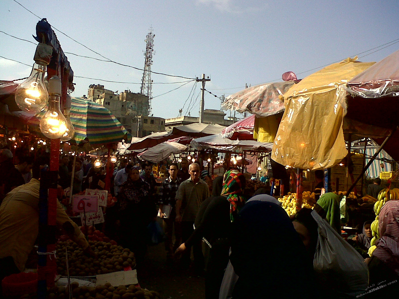 Market in Alexandria